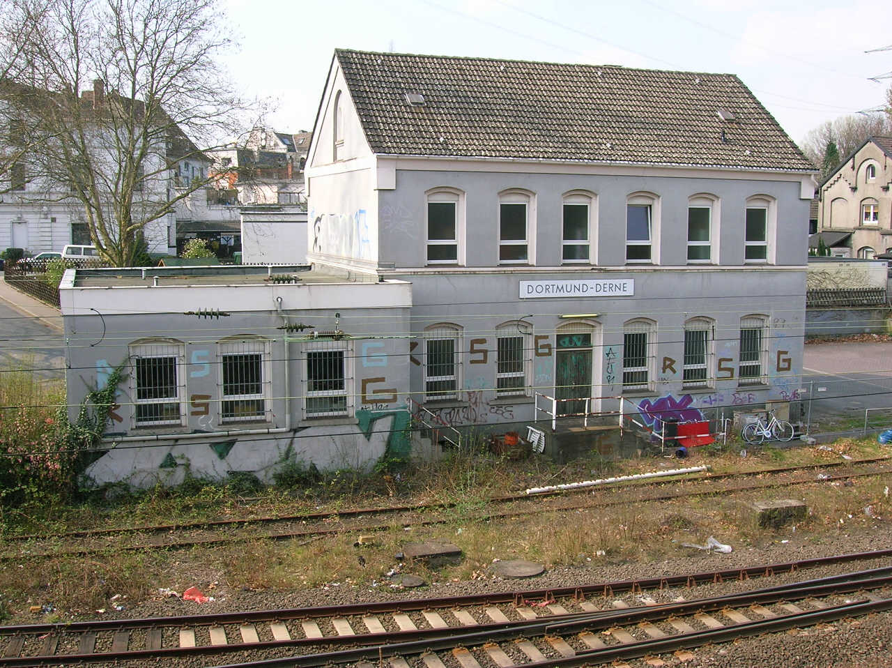 Bahnhofsgebaeude Dortmund-Derne